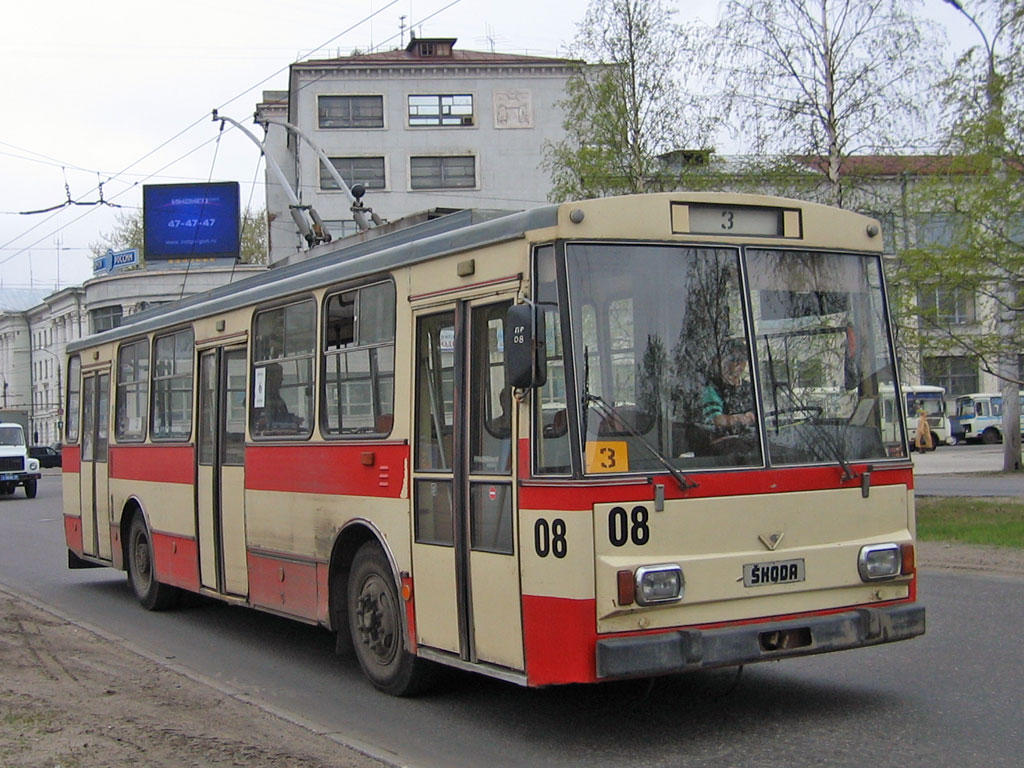 Шкода на воскресенской